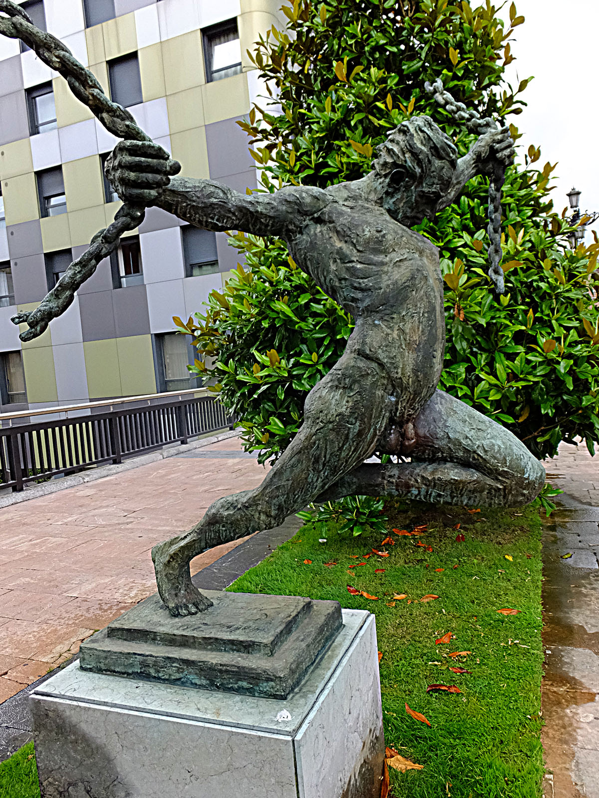 Sculptures